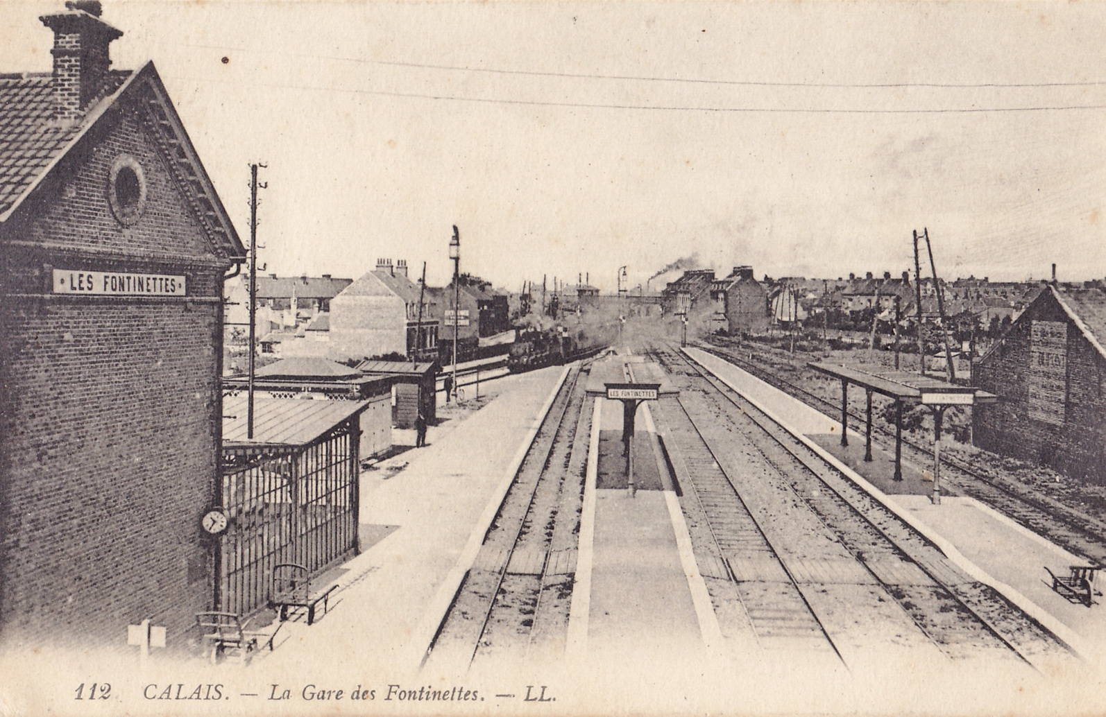 Carte postale ancienne éditée par LL, n°112 : CALAIS - La Gare des Fontinettes